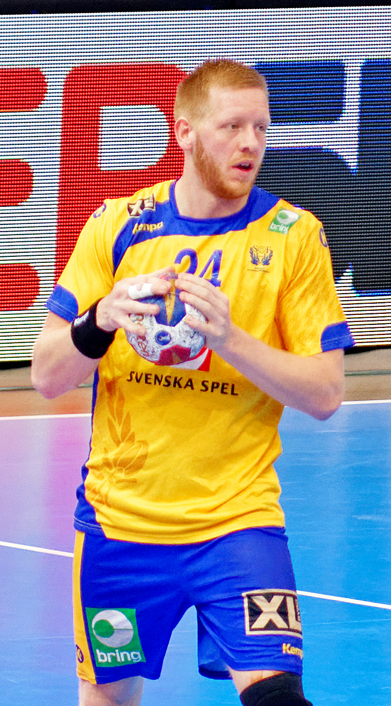 Match de la phase préliminaire du championnat du monde masculin de handball 2017 entre la Suède et le Qatar (Groupe D). A Bercy, le 18 janvier 2017.